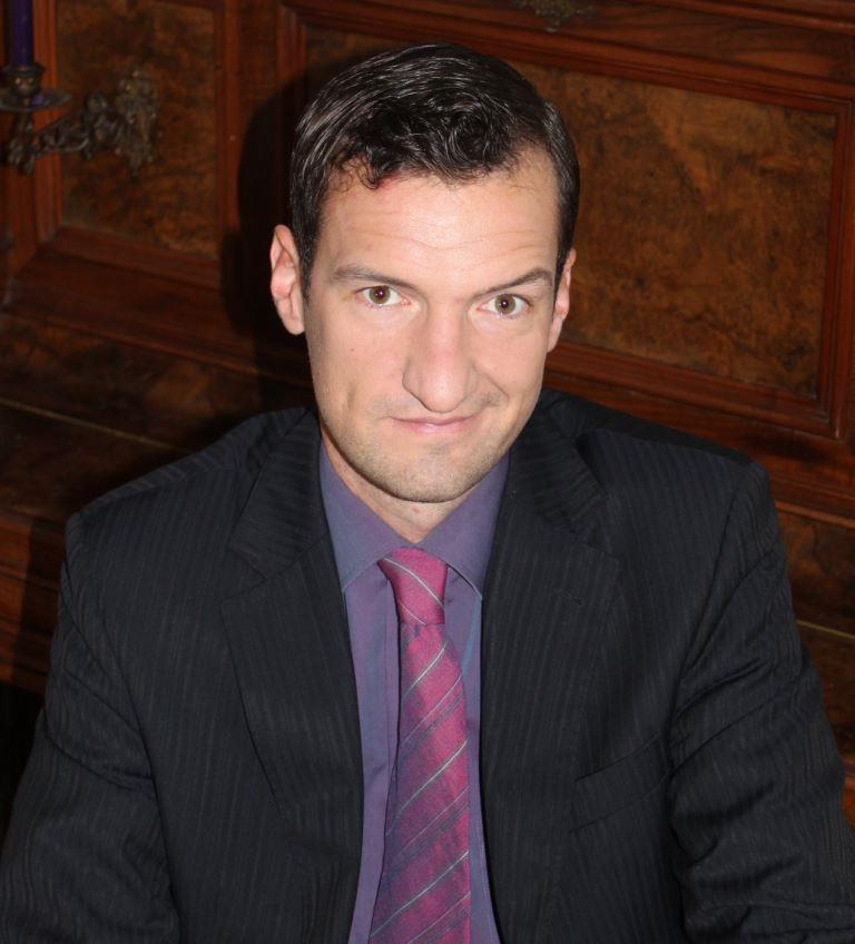 Mister Carsle in 2014